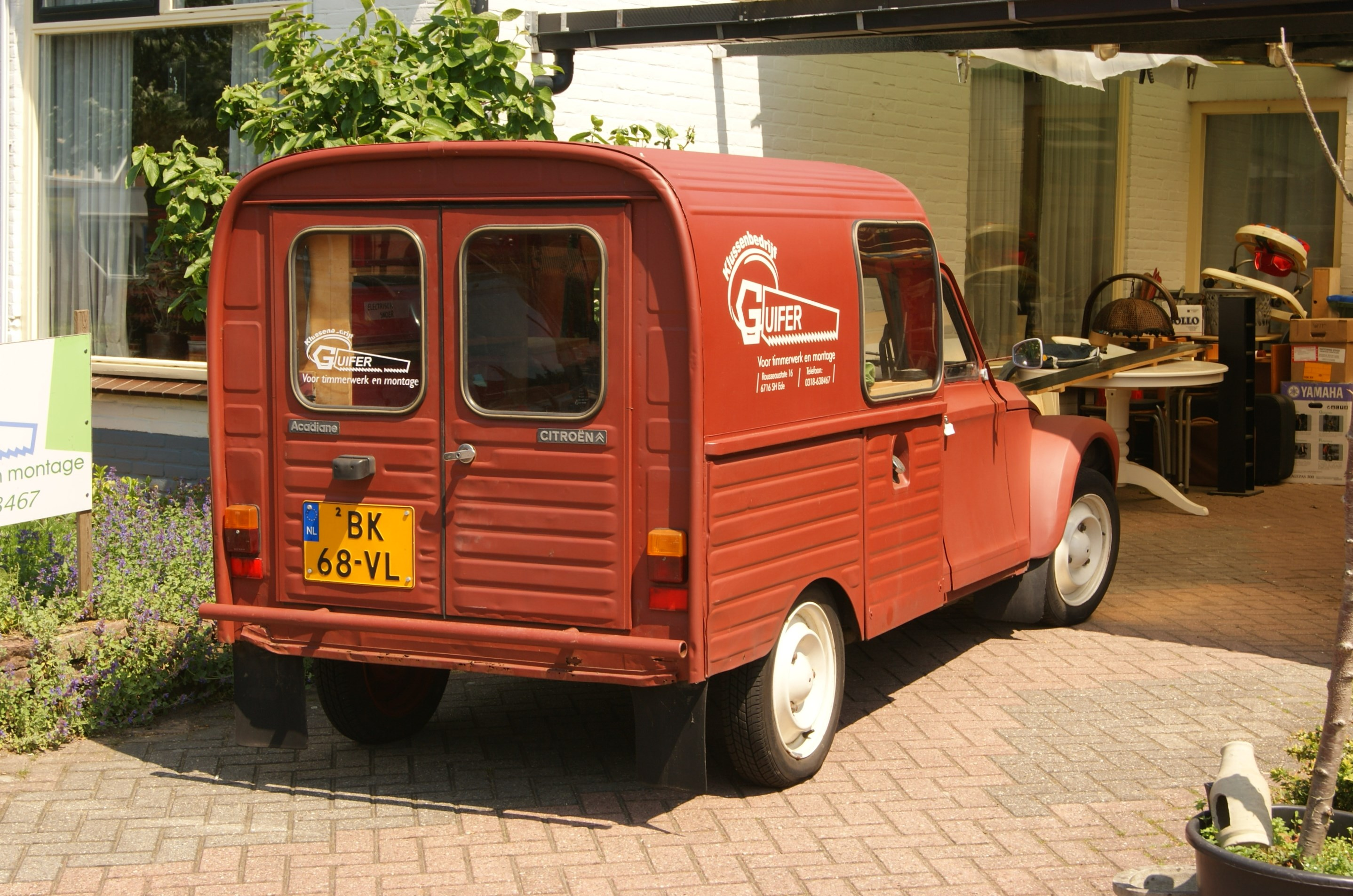 BK-68-VL